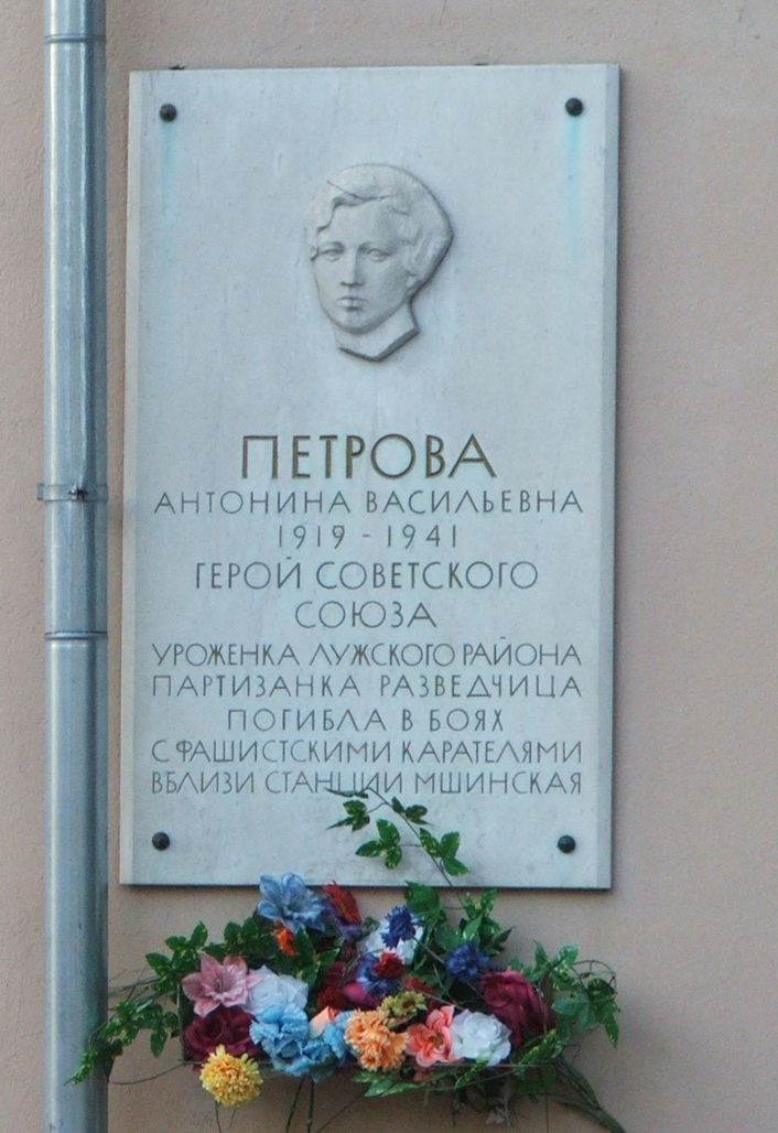 Мемориальная доска на улице Тоси Петровой в городе Луга, Ленинградская область